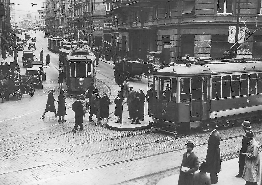 31 dicembre 1929, ultimo giorno dei tram al centro di Roma. Largo del Tritone.